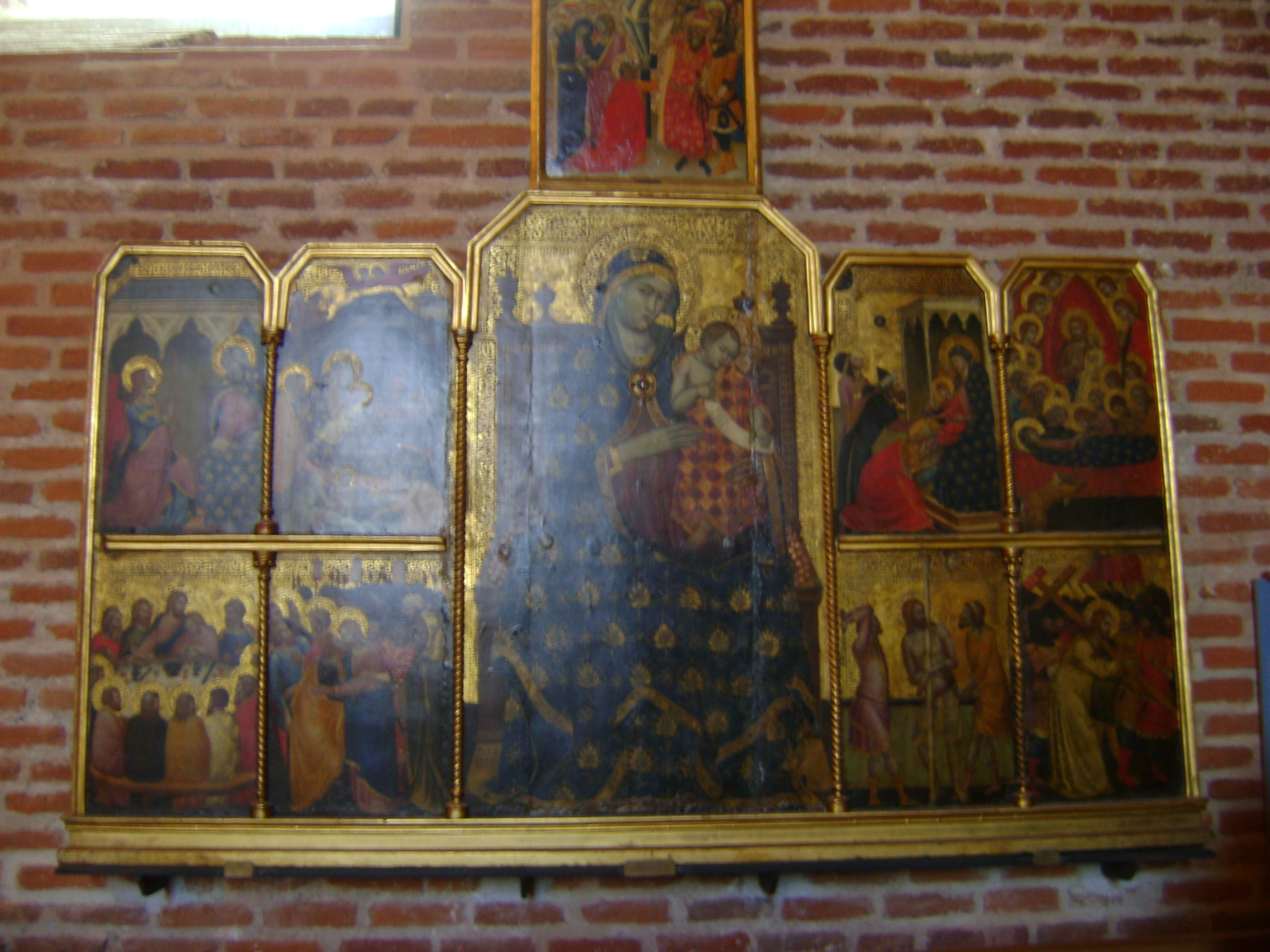 Cathédrale Sainte-Cécile, Albi, Tarn; le Trésor, polyptyque Vie du Christ de 1345.